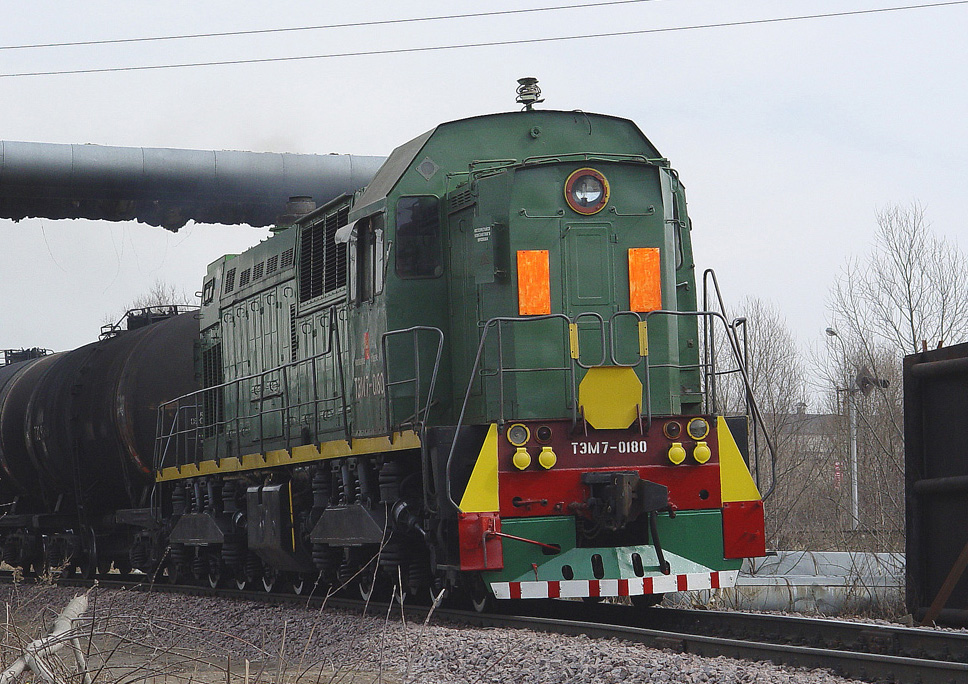 Тепловоз ТЭМ7-0180 подъездные пути от ст. Яничкино до нефтеперерабатывающего завода в Капотне. Москва.